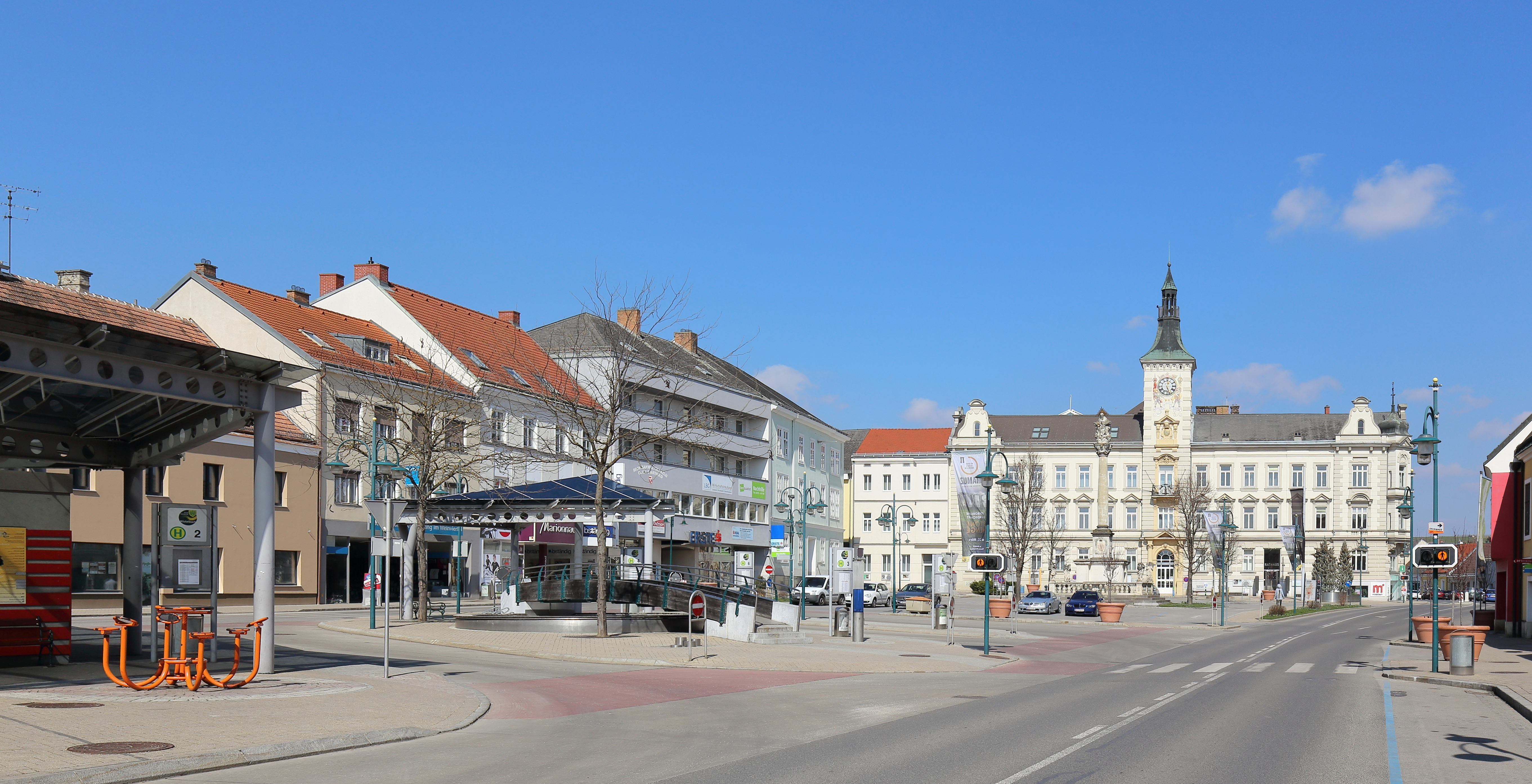 Nördlicher Teil des Hauptplatzes der niederösterreichischen Bezirkshauptstadt Mistelbach mit dem 1901 errichteten Rathaus als Abschluss.